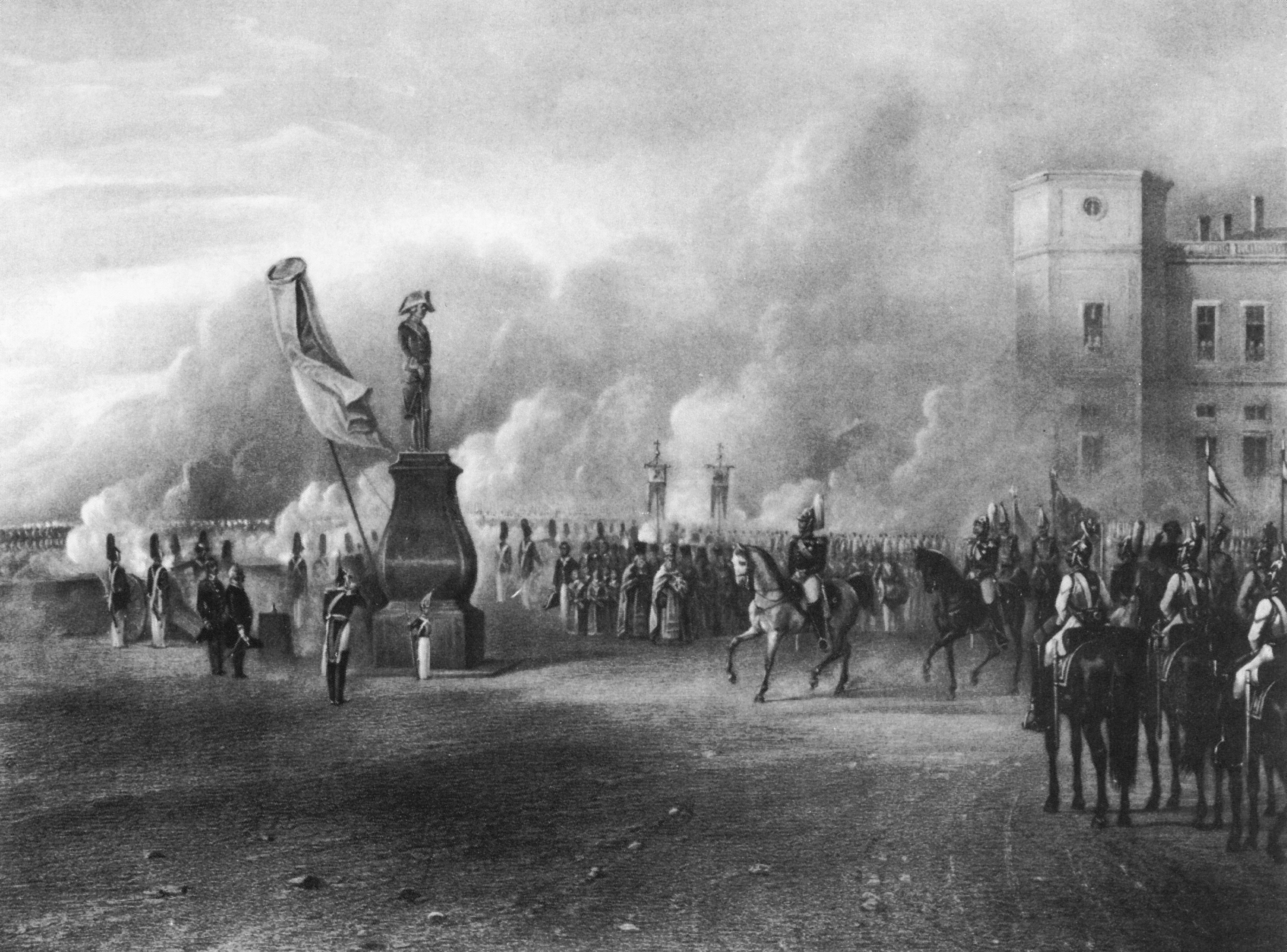 Открытие памятника Павлу I около Большого Гатчинского дворца. Литография.